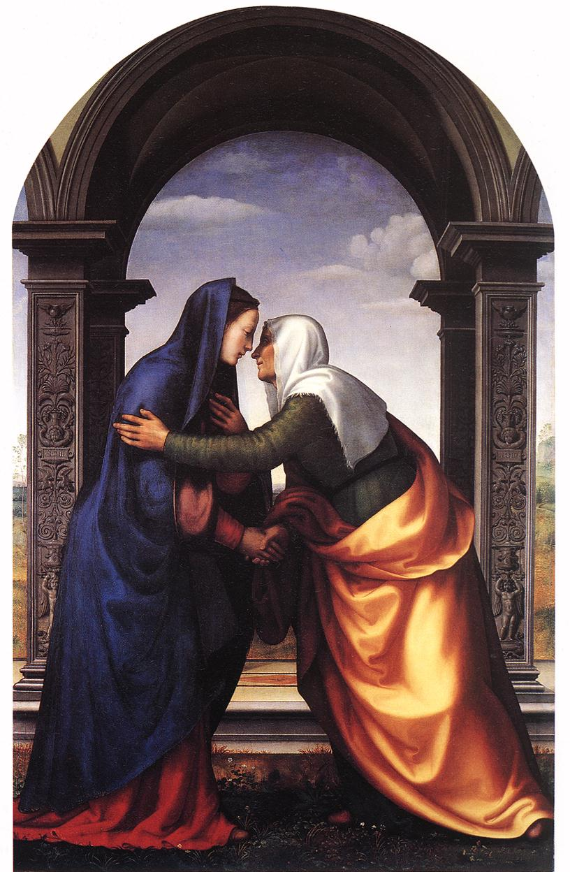 Visitation